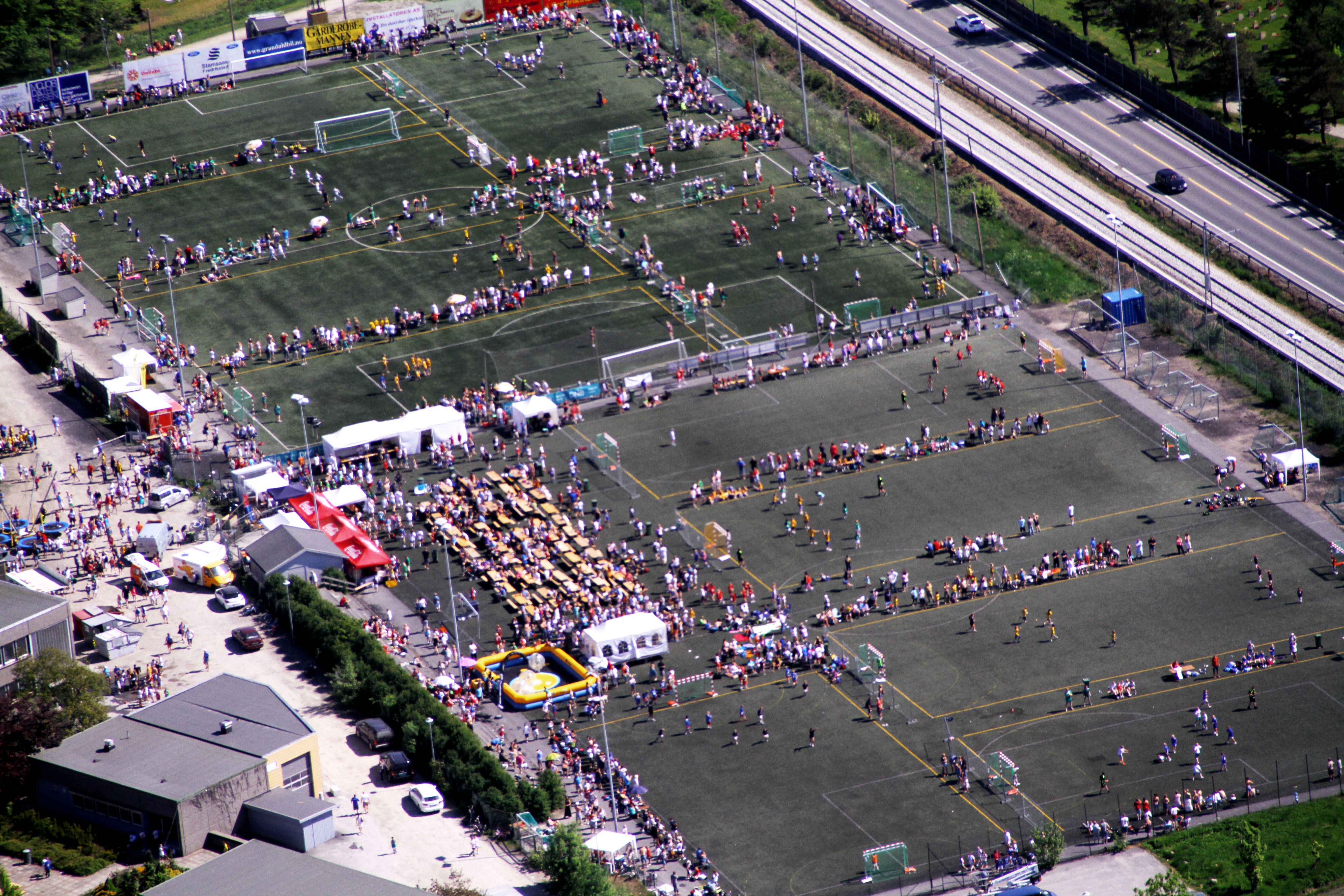 Merkur